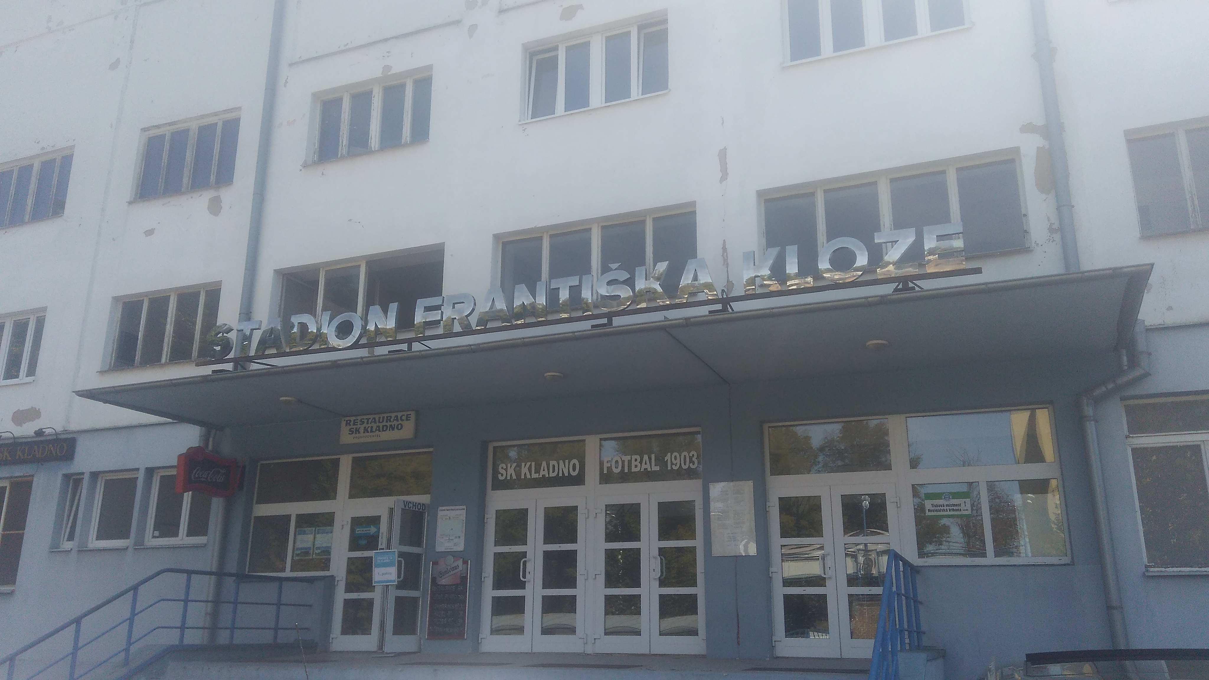 vstup do budovy stadionu F. Kloze